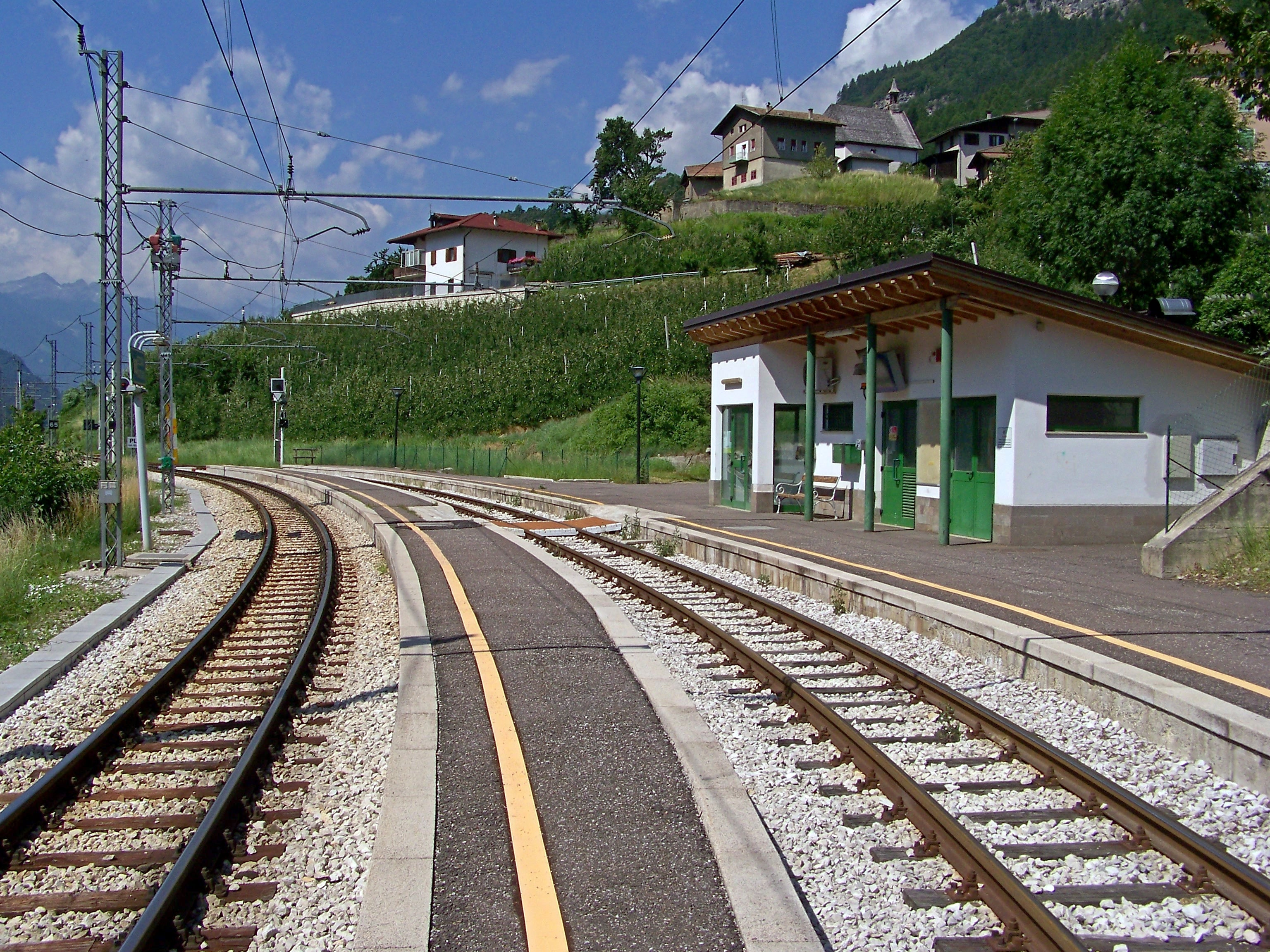 Il piazzale binari e il fabbricato di servizio della stazione di Bozzana-Bordiana